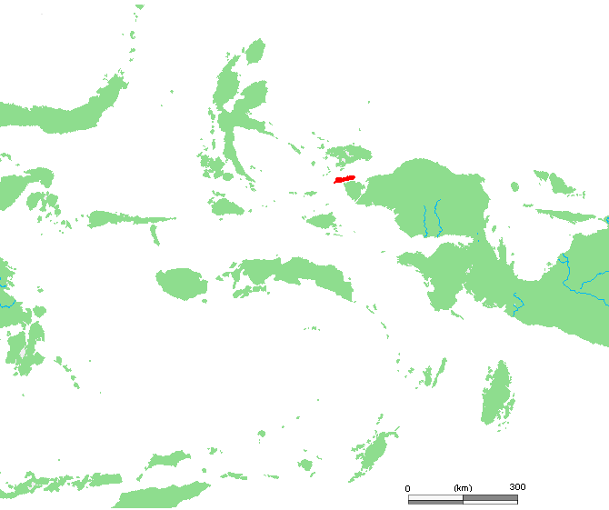 ID Bantanta.PNG